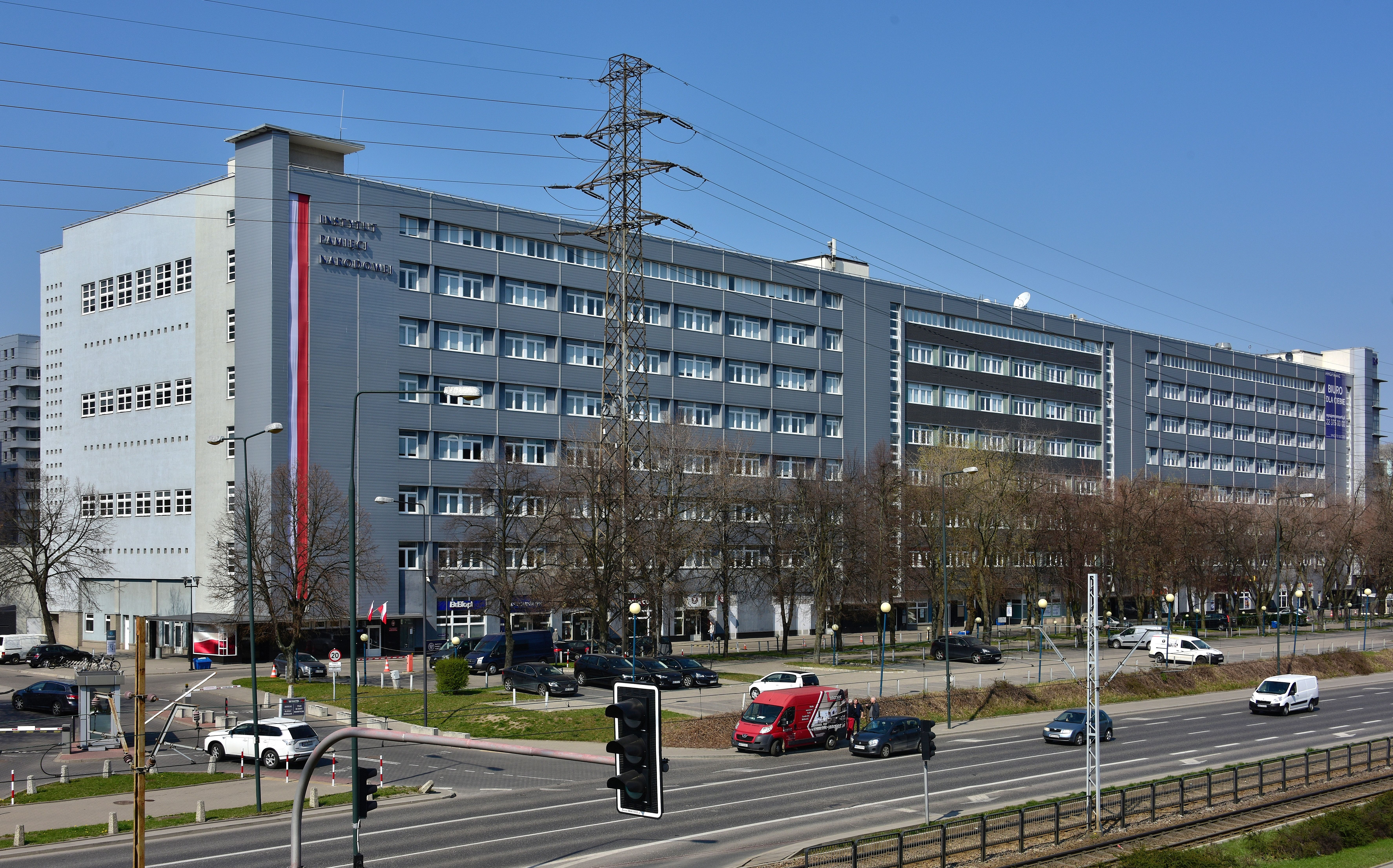 Siedziba Instytutu Pamięci Narodowej przy ul. Wołoskiej 7 w Warszawie